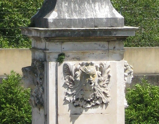 Mosteiro de Alcobaça, Obelisk,French Gardens, 17th century